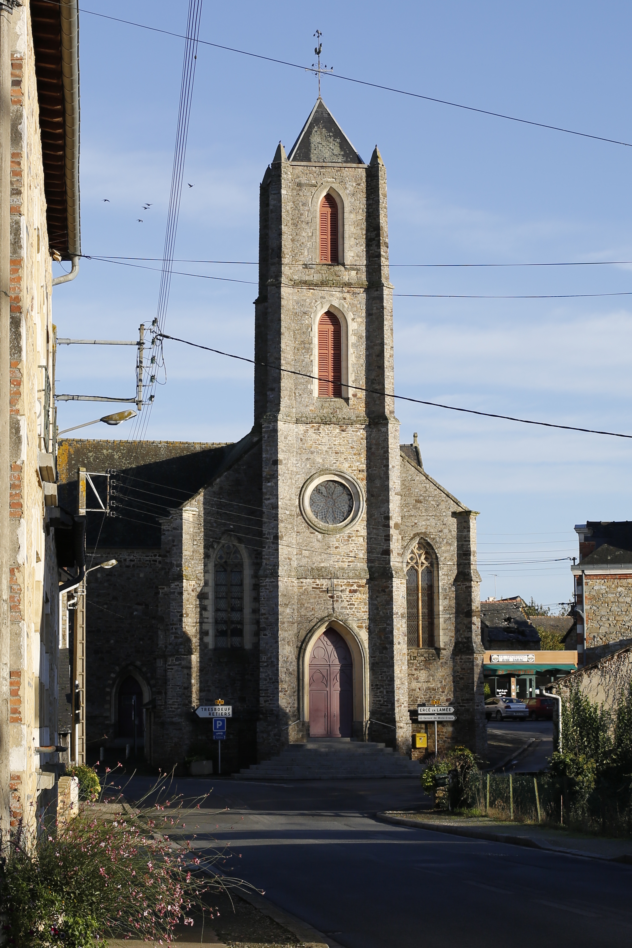 Église de la Sainte-Trinité à La Bosse-de-Bretagne.